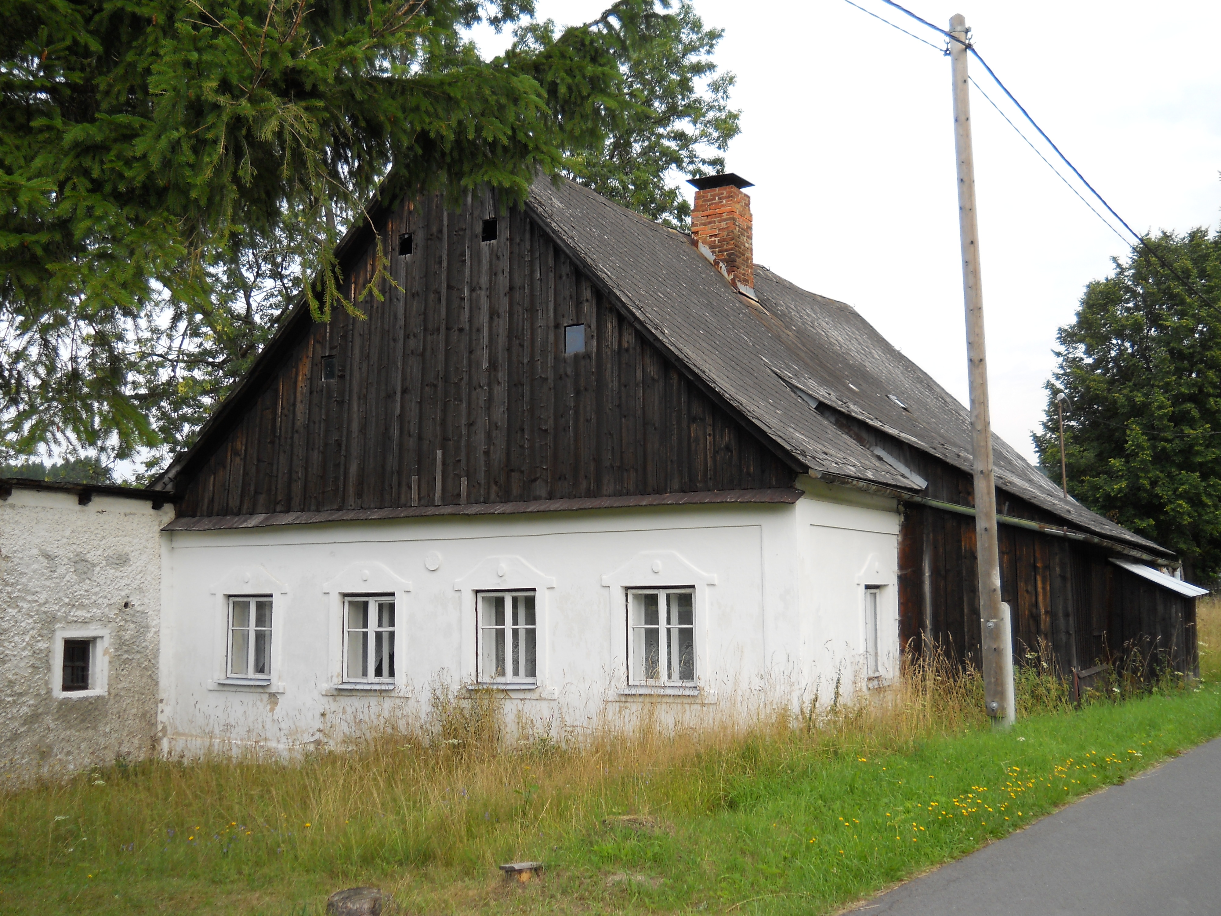 Původní německá chalupa z roku 1924 (dle zazděného data) v osadě Harrachov nedaleko Rýmařova